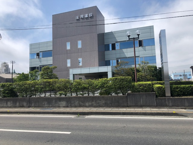 庄司建設工業本社。福島県南相馬市原町区青葉町1-1